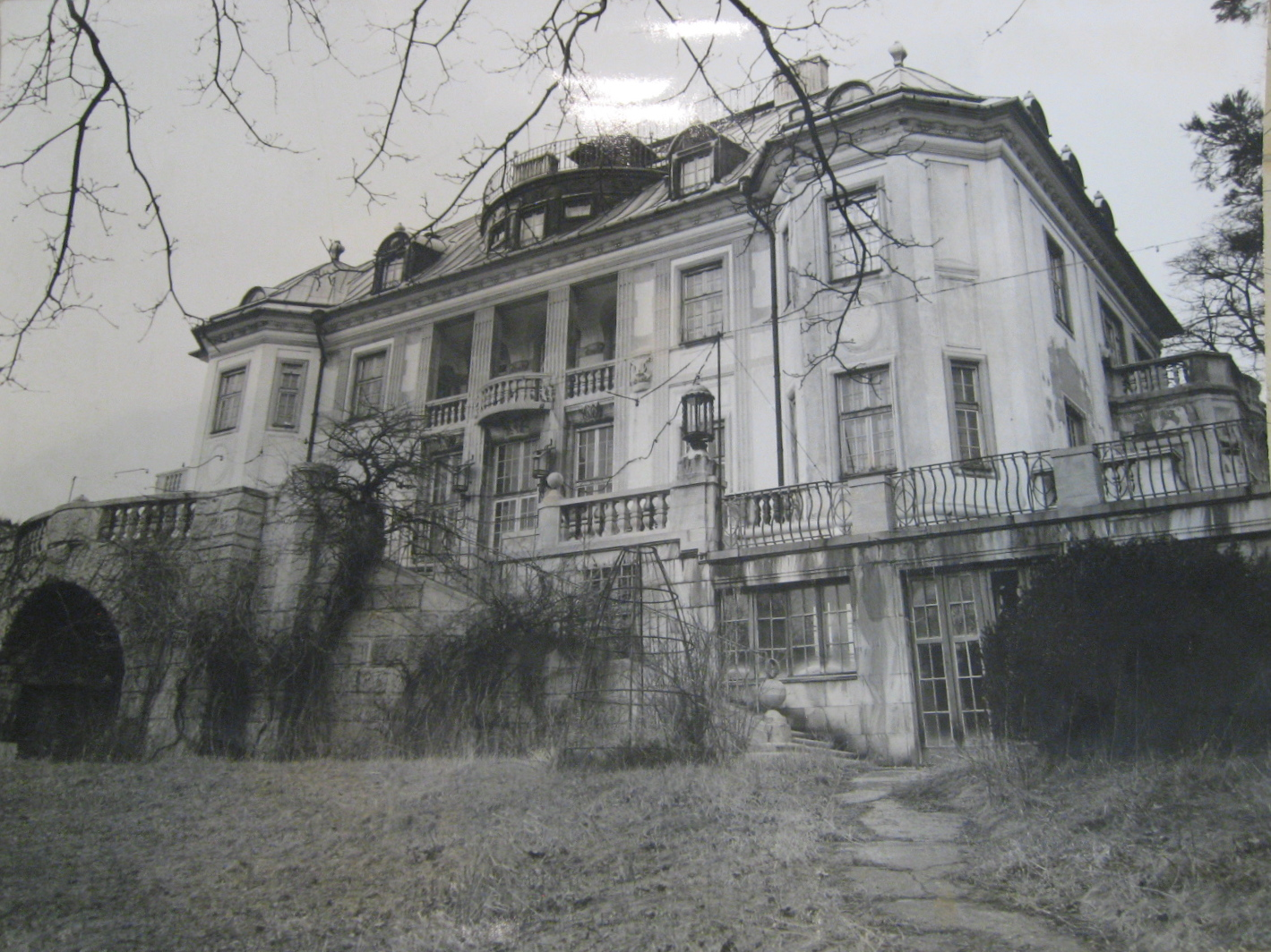 Süd-Ansicht. Sogenannte Regenstreif-Villa, abgebrochen. Starkfriedgasse / Pötzleinsdorfer Straße, heute Studentenheim. Spende der Bundeskammer der gewerblichen Wirtschaft. Inv. 820.